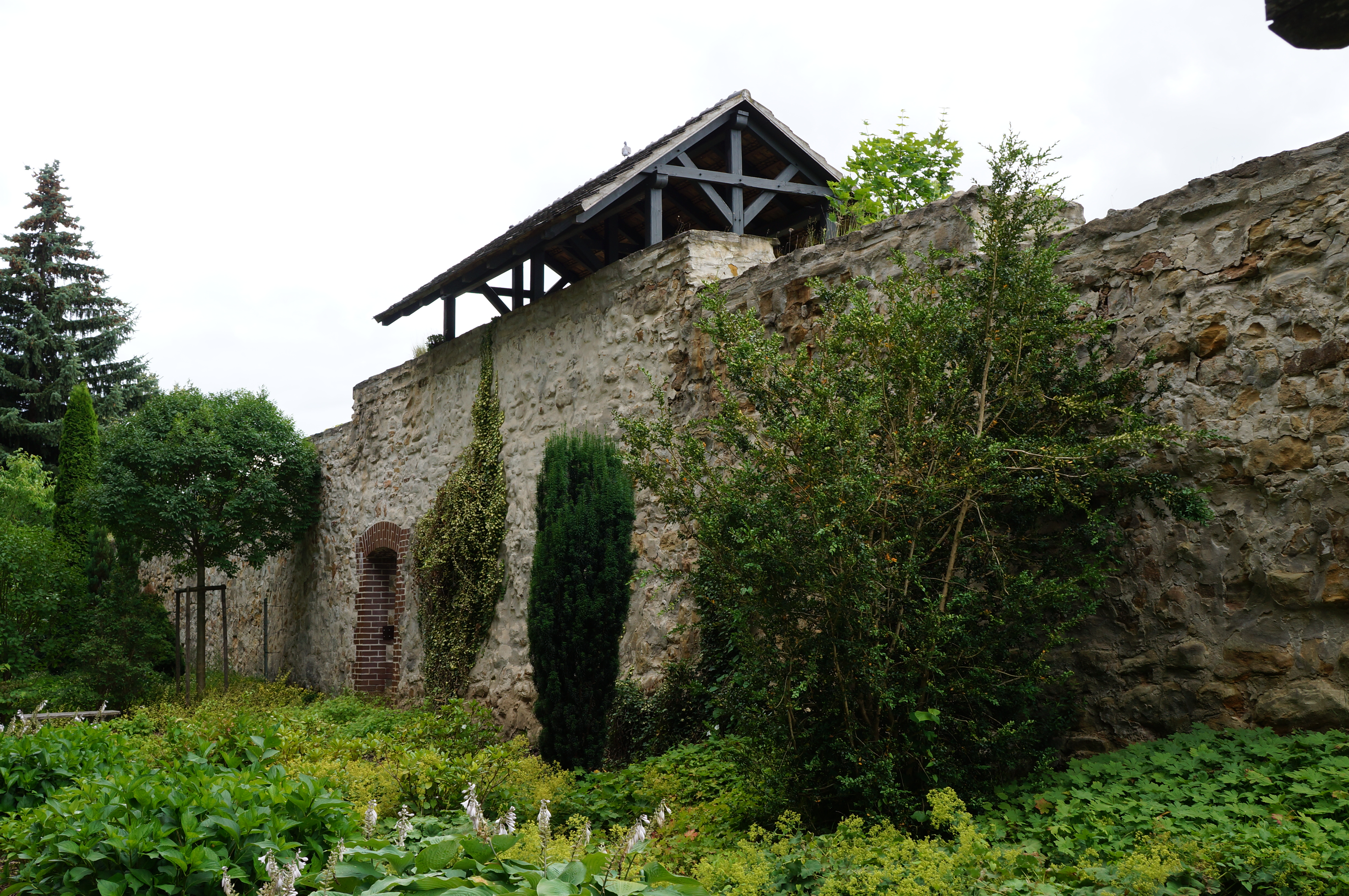 Schmöllner Stadtmauer (Oberseite)